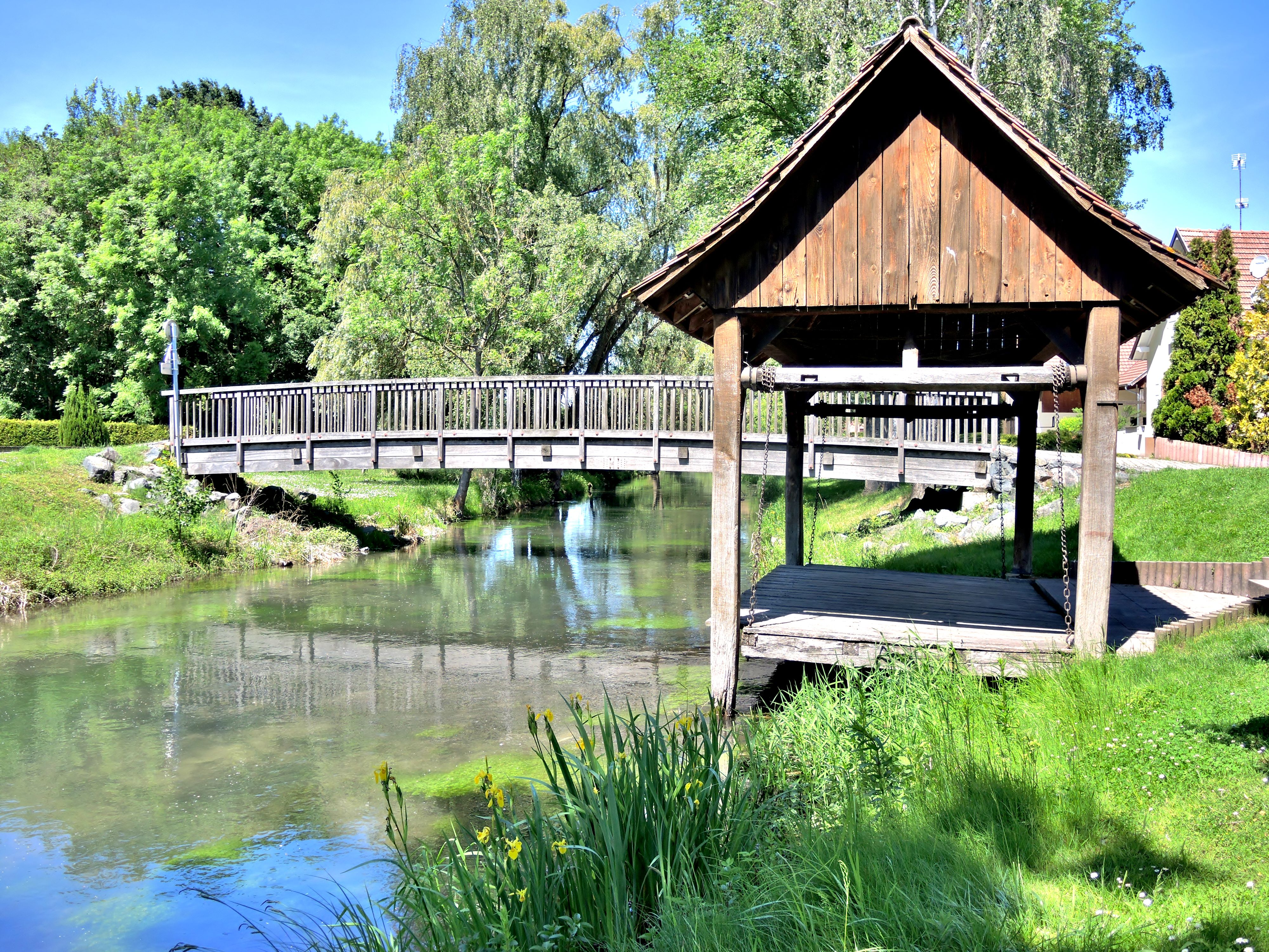 Lavoir au plancher ajustable en hauteur, sur la rivière Zembs. Herbsheim, Bas-Rhin.